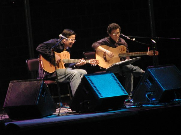 Gerardo Pablo en concierto con Alejandro Filio (donde?)